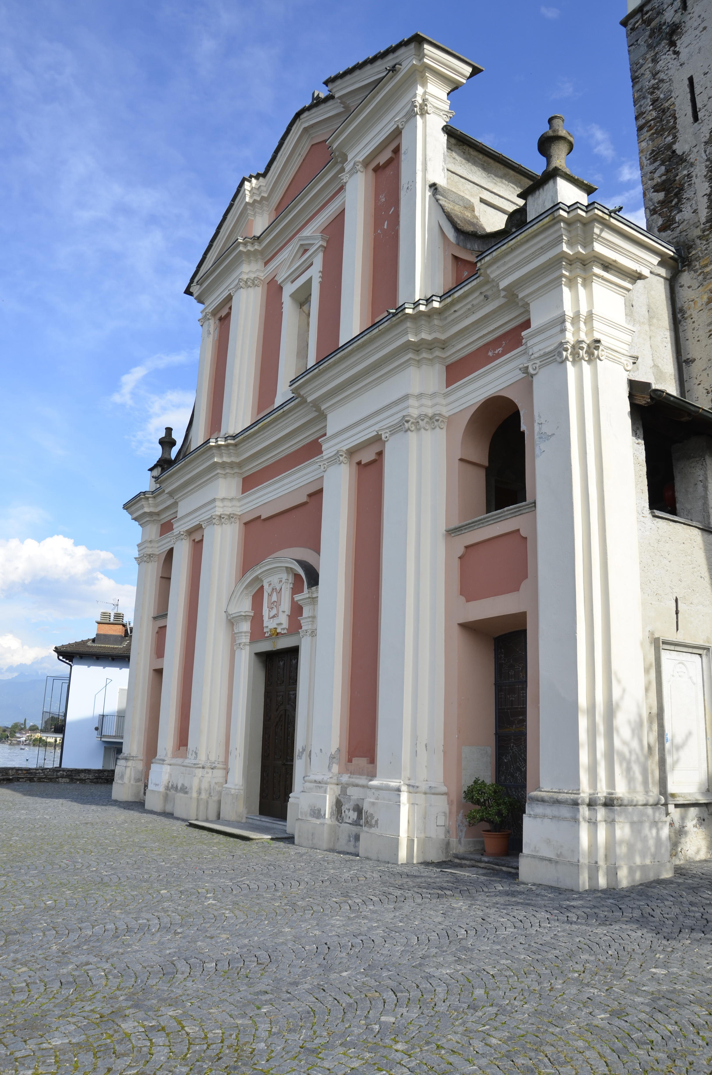 Chiesa parrocchiale dei SS.Pietro e Paolo